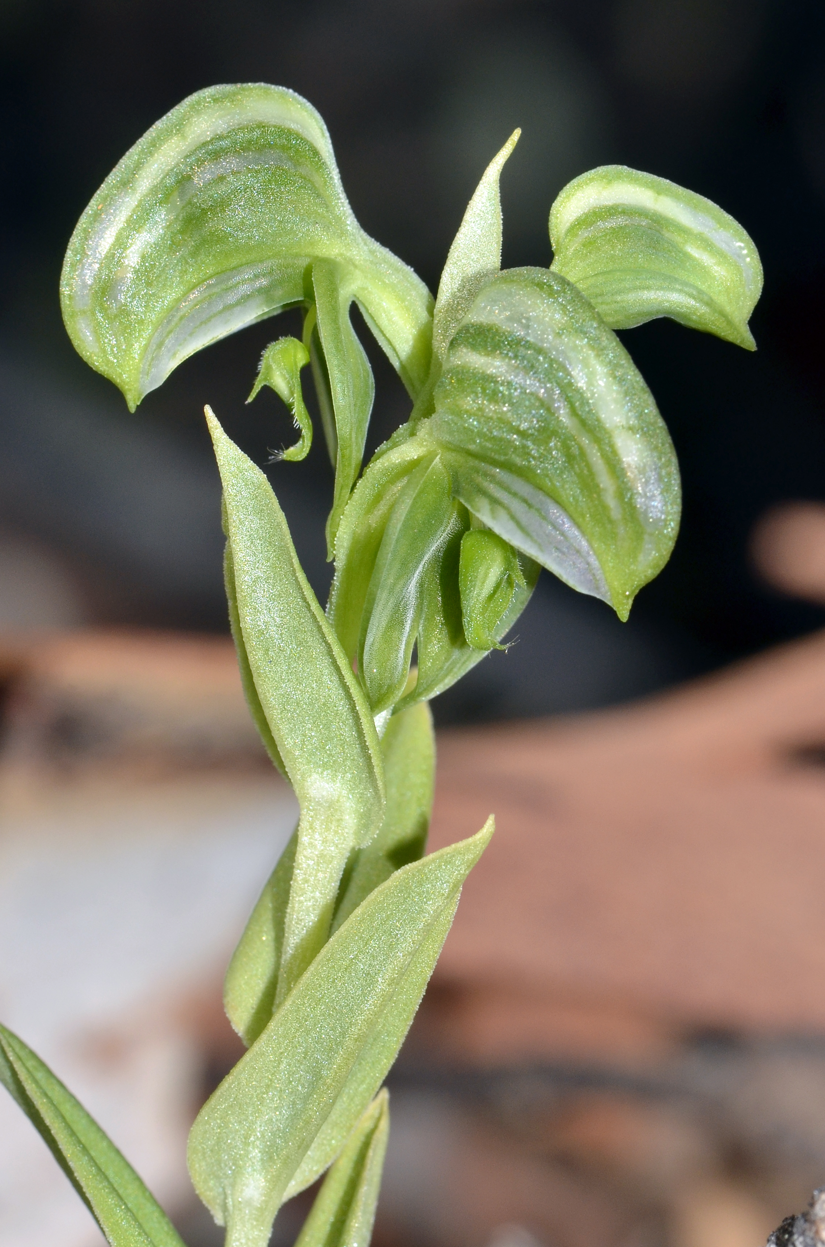 Pterostylis sanguinea